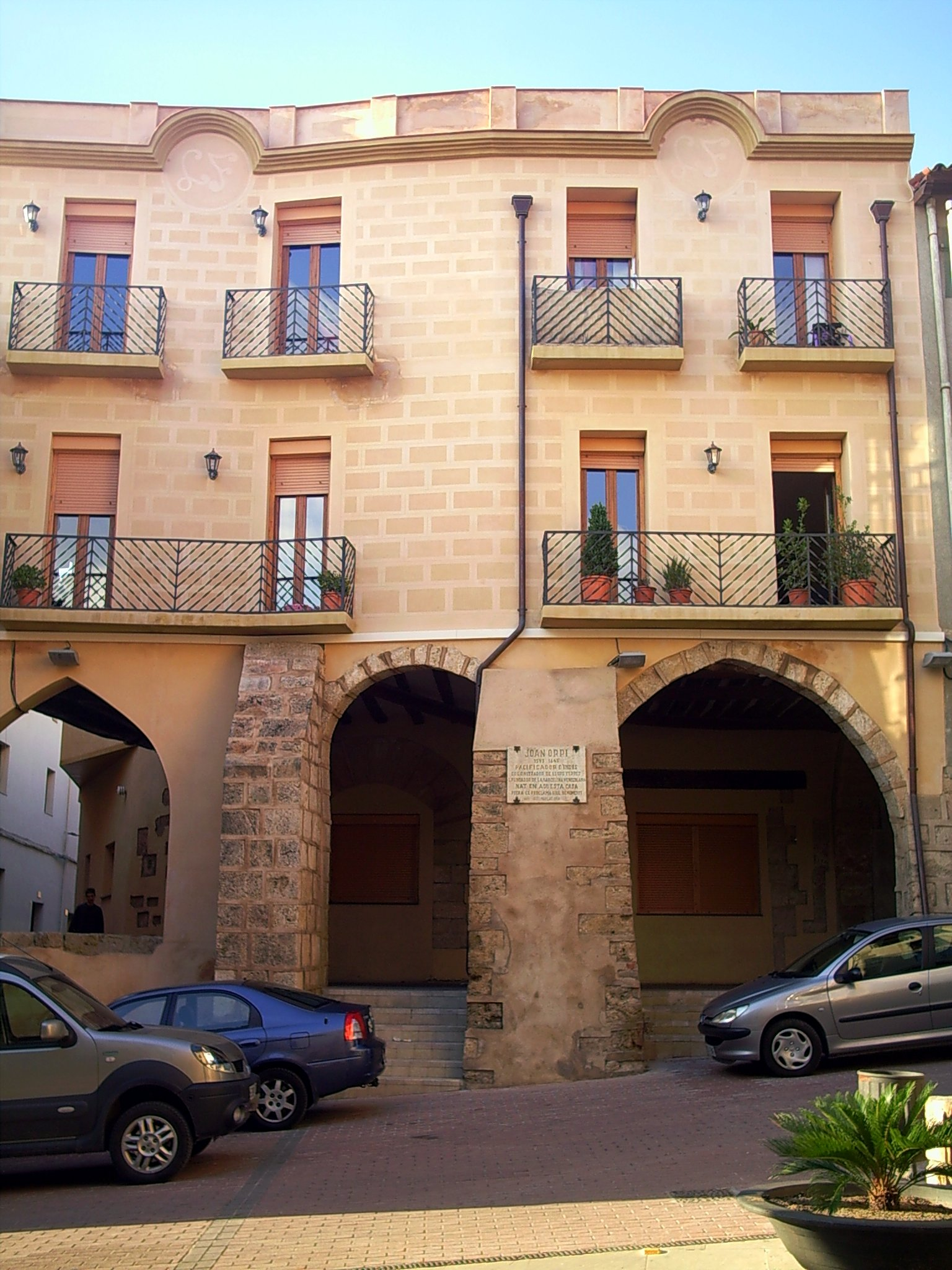 Casa de Joan Orpí i del Pou, a la plaça Joan Orpí, a Piera, l'Anoia, (Catalunya).